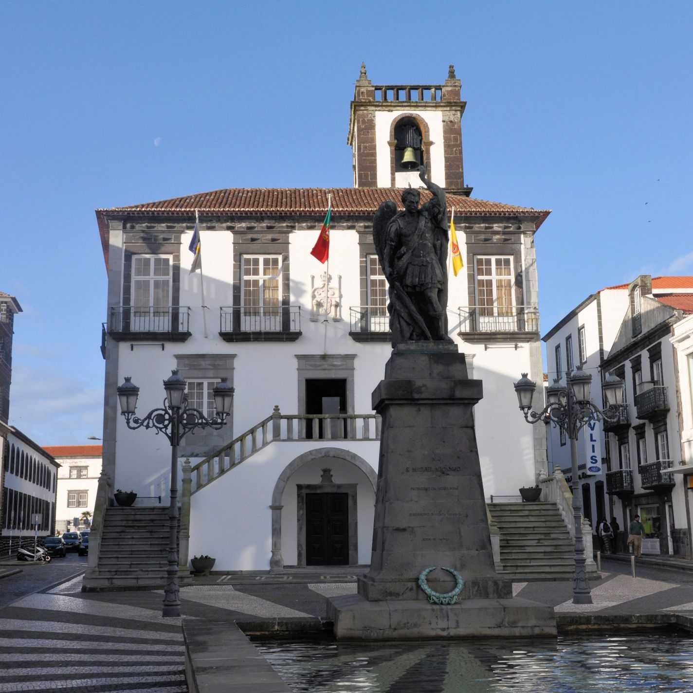 San Miguel Arcanjo, Ponta Delgada